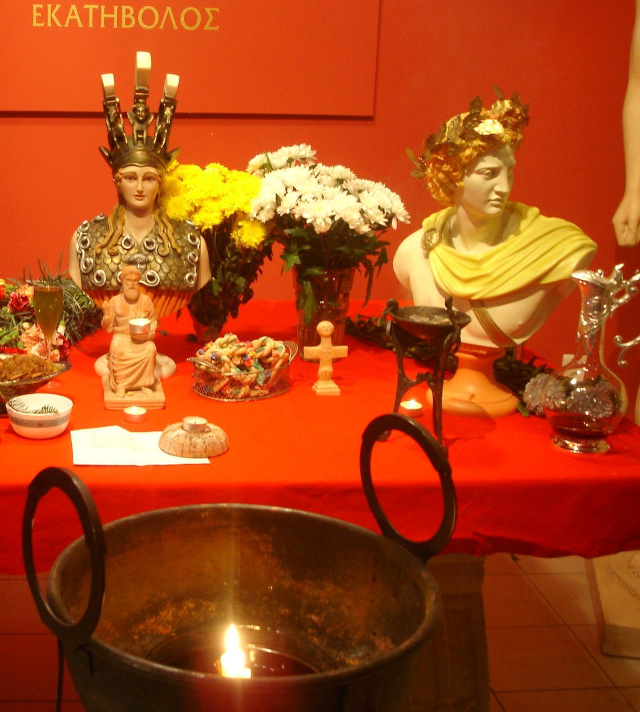 Hellen altar.